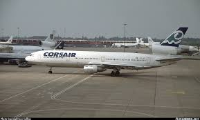 MD-10